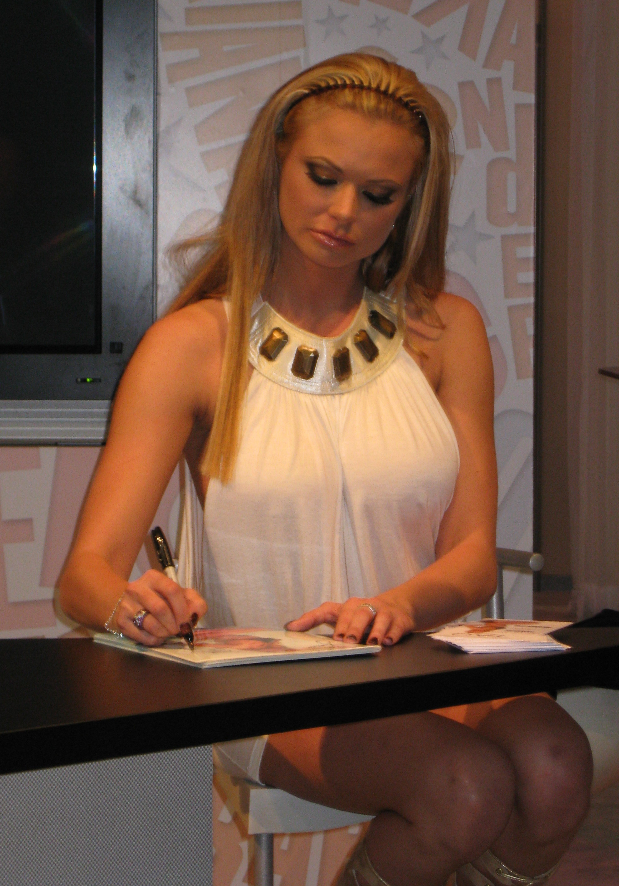 AEE2008_Day1 134